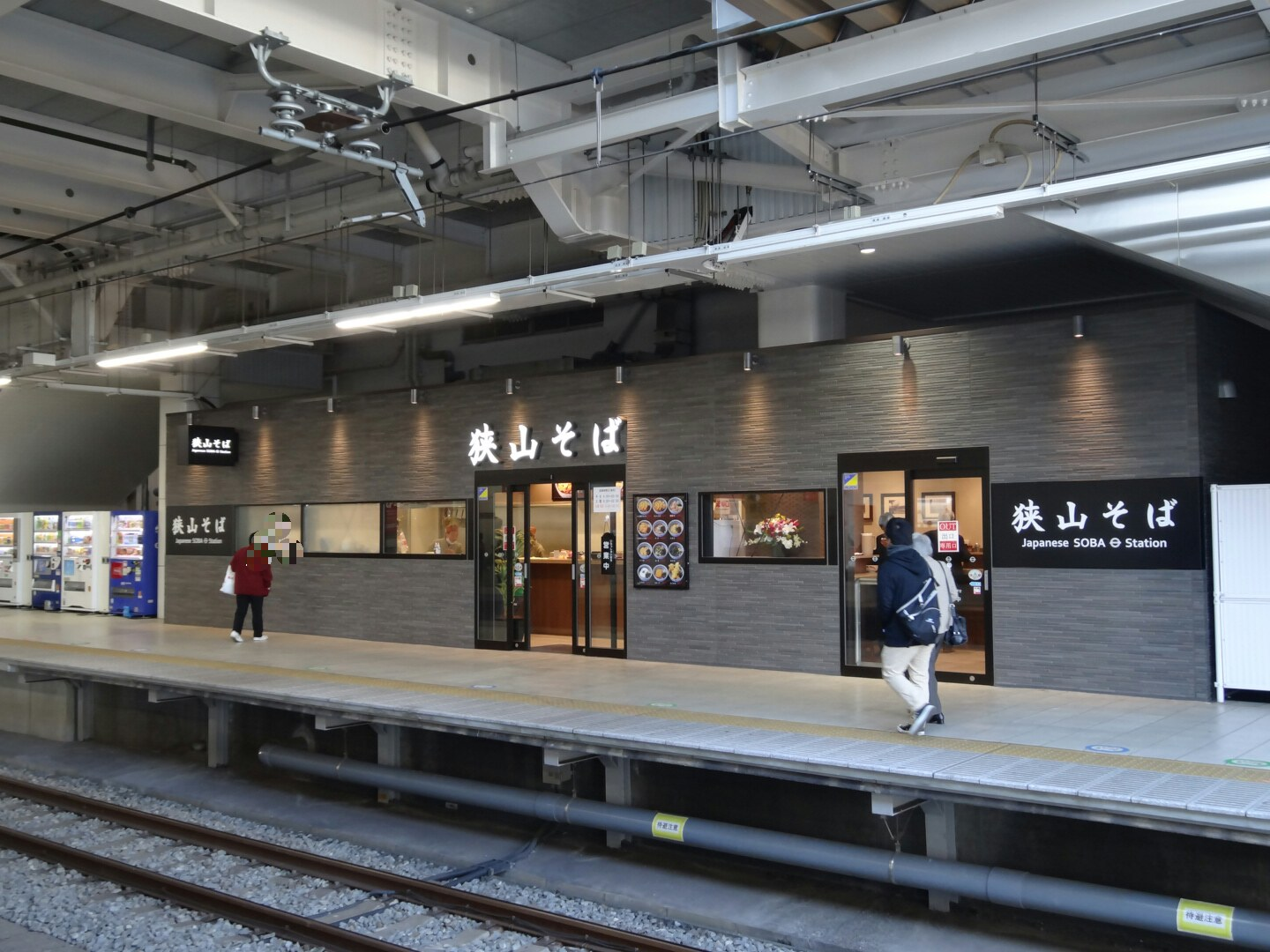 Syamasoba-tokorozwa 2013/11/14